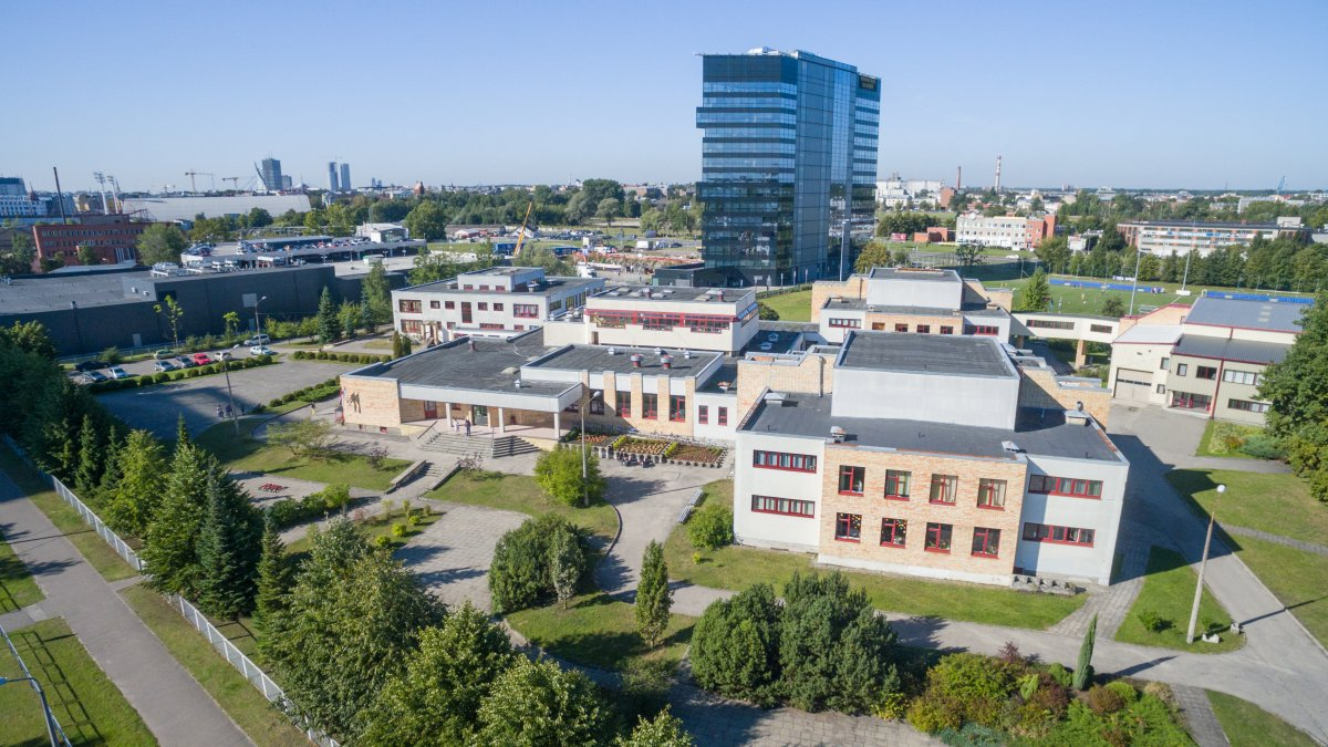 Rīgas Hanzas vidusskola